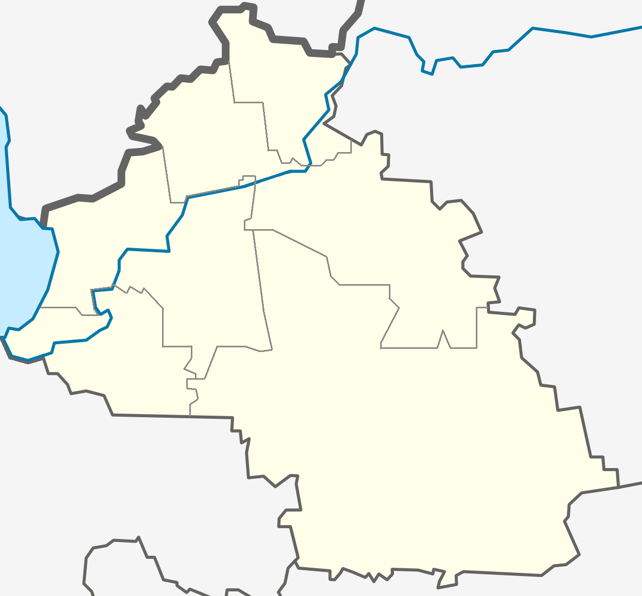 Карта Лодейнопольского района Ленинградской области с делением на муниципальные образования.